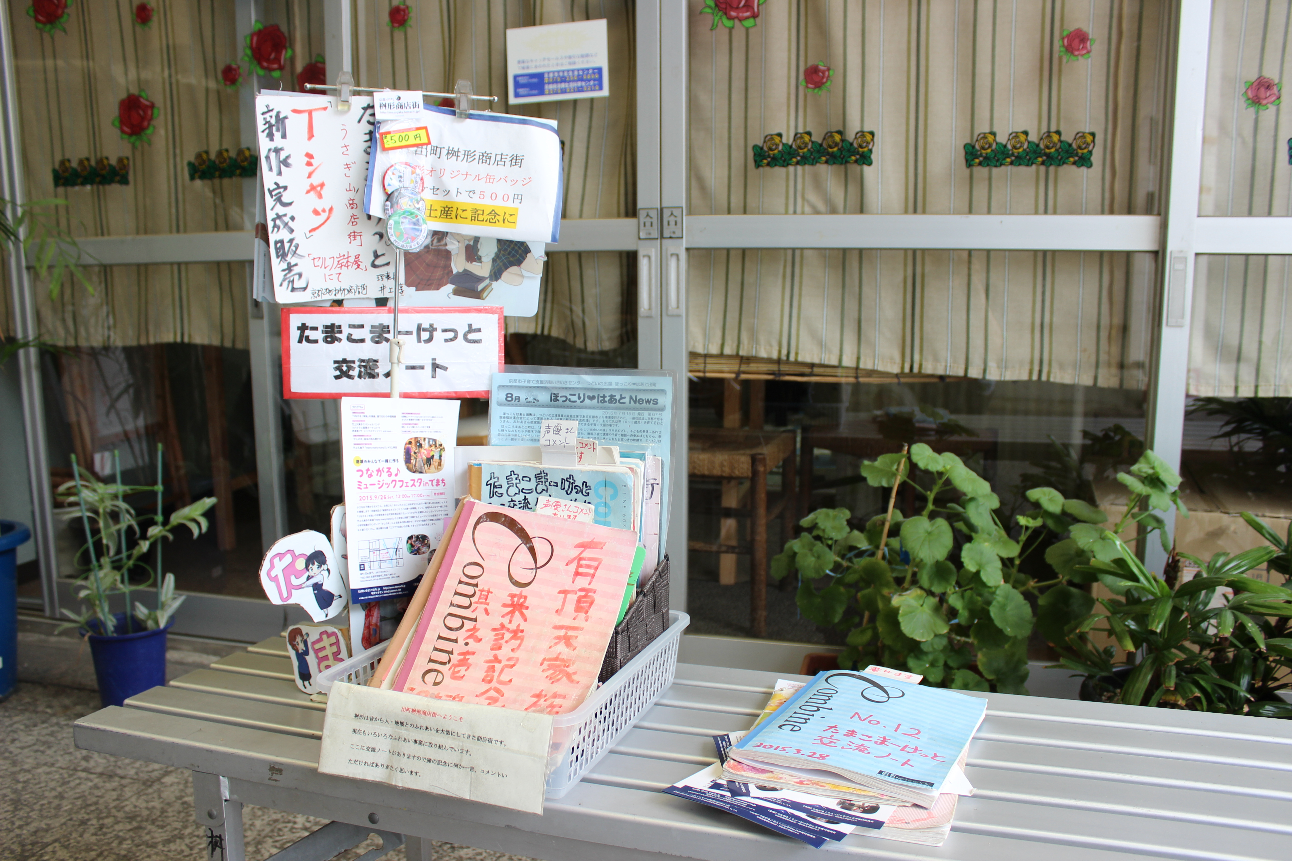 中文（中国大陆）: 日本京都府京都市上京区出町商店街，为动画《玉子市场》、《有顶天家族》设置的圣地巡礼交流角。中文（台灣）: 日本京都府京都市上京區出町商店街，為動畫《玉子市場》、《有頂天家族》設置的聖地巡禮交流角。